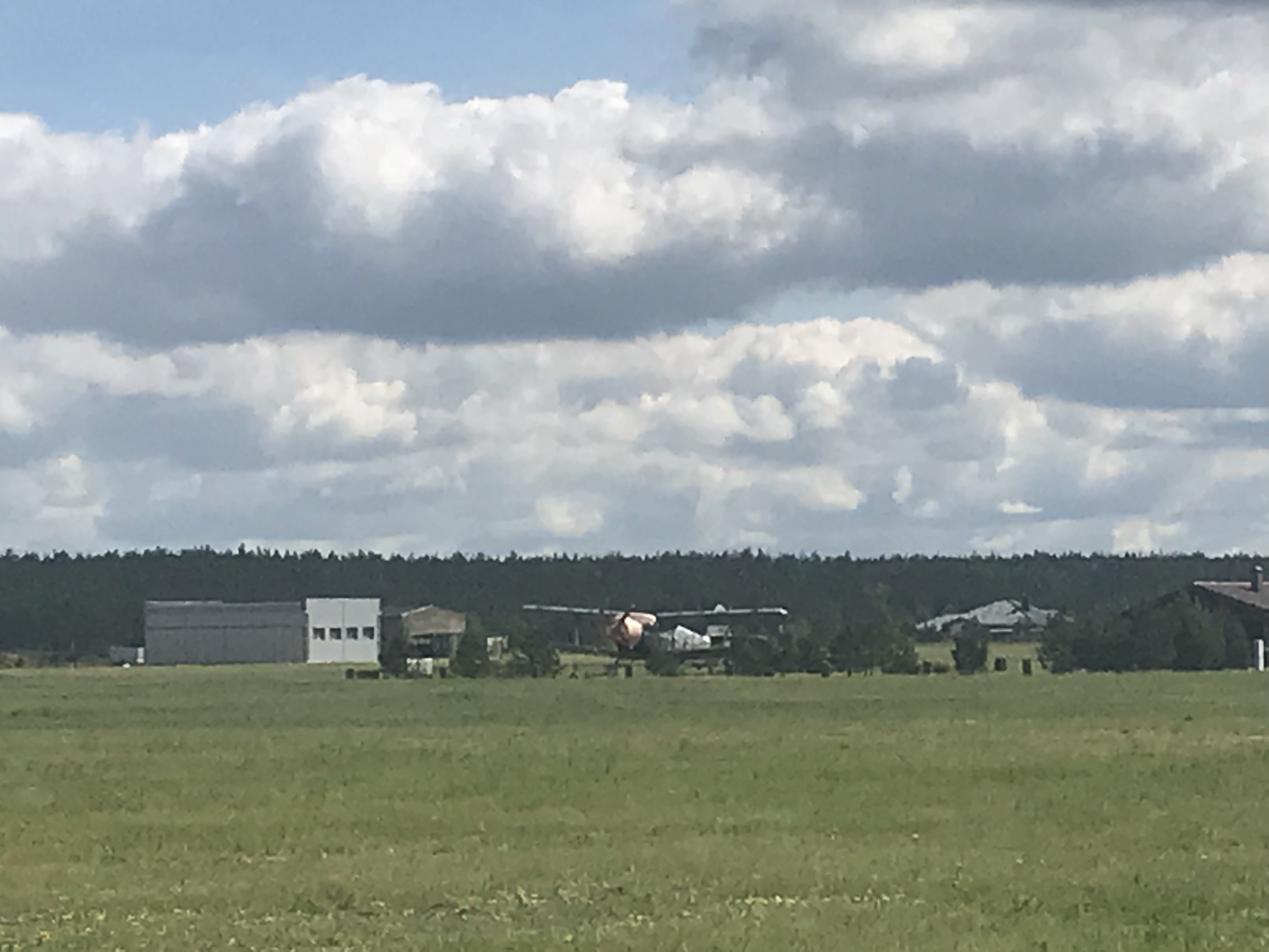 Genomen tijdens een wandelproject Amsterdam-Moskou